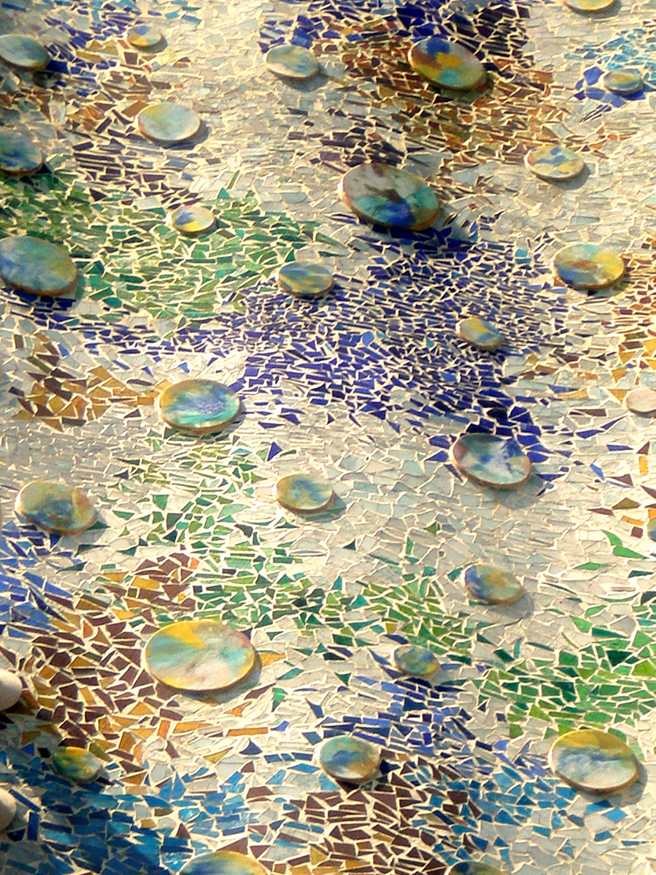 Casa Batlló (Barcelona)